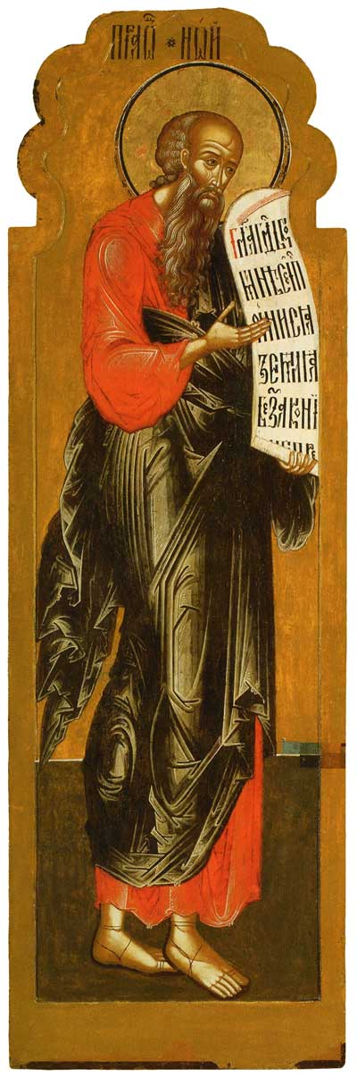 Праотец Ной. Праотеческий чин из главного иконостаса ц. Иоанна Златоуста в Коровниках в Ярославле